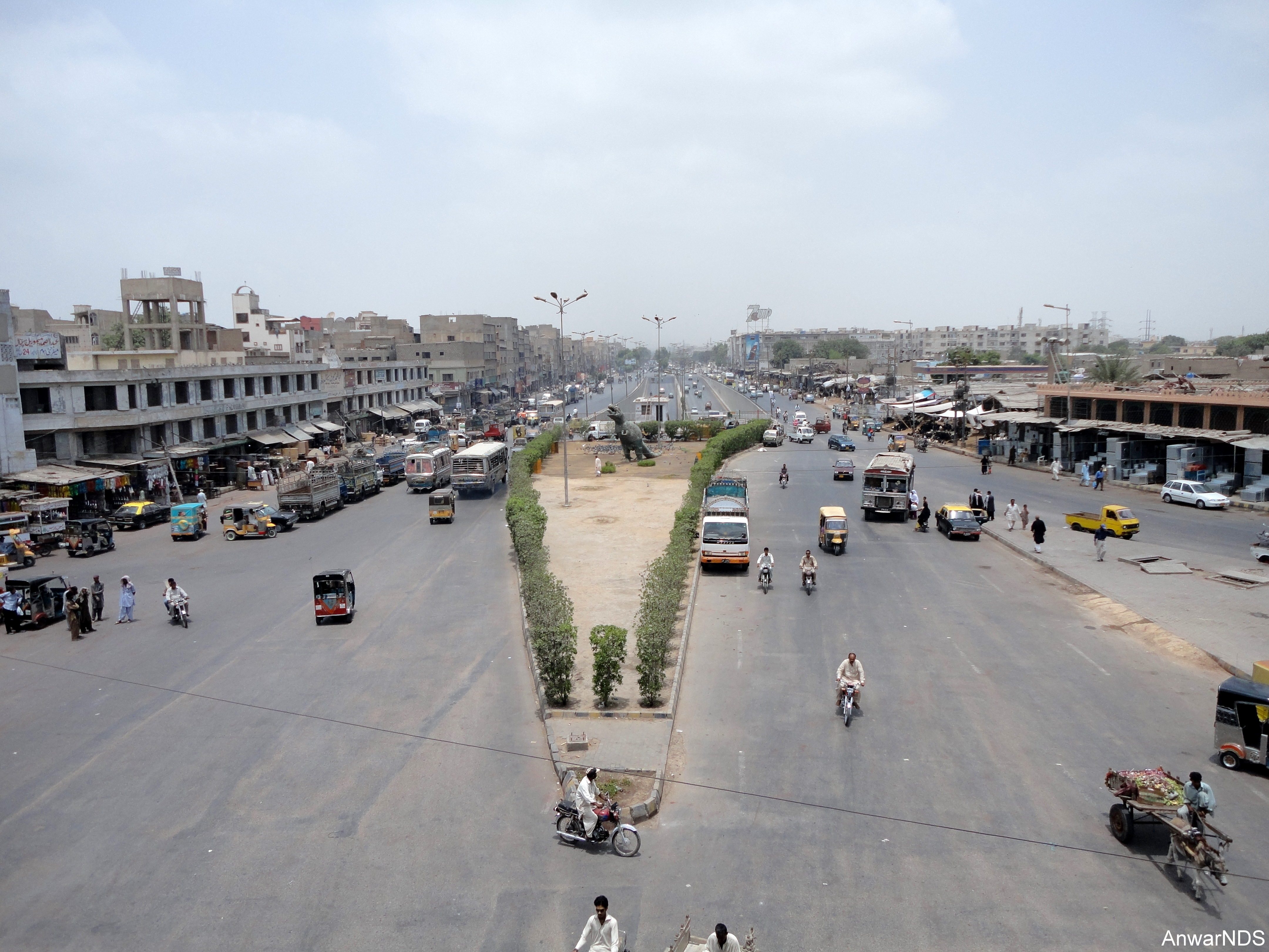 Karachi, Liaquatabad # 10